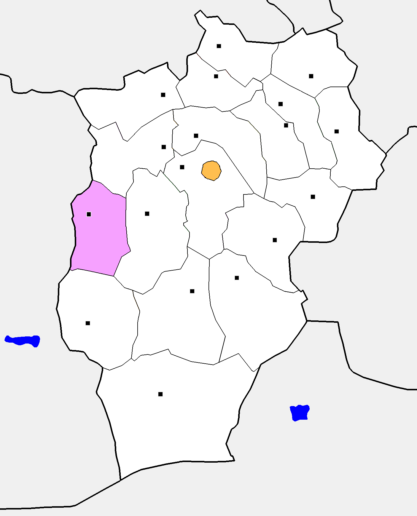 Монгол: Өвөрхангай аймгийн Нарийнтээл сумын байршил